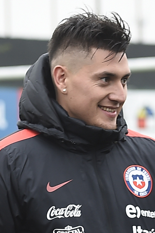 Presidenta a la Selección Nacional: “Muchas gracias por estas alegrías que nos han dado”